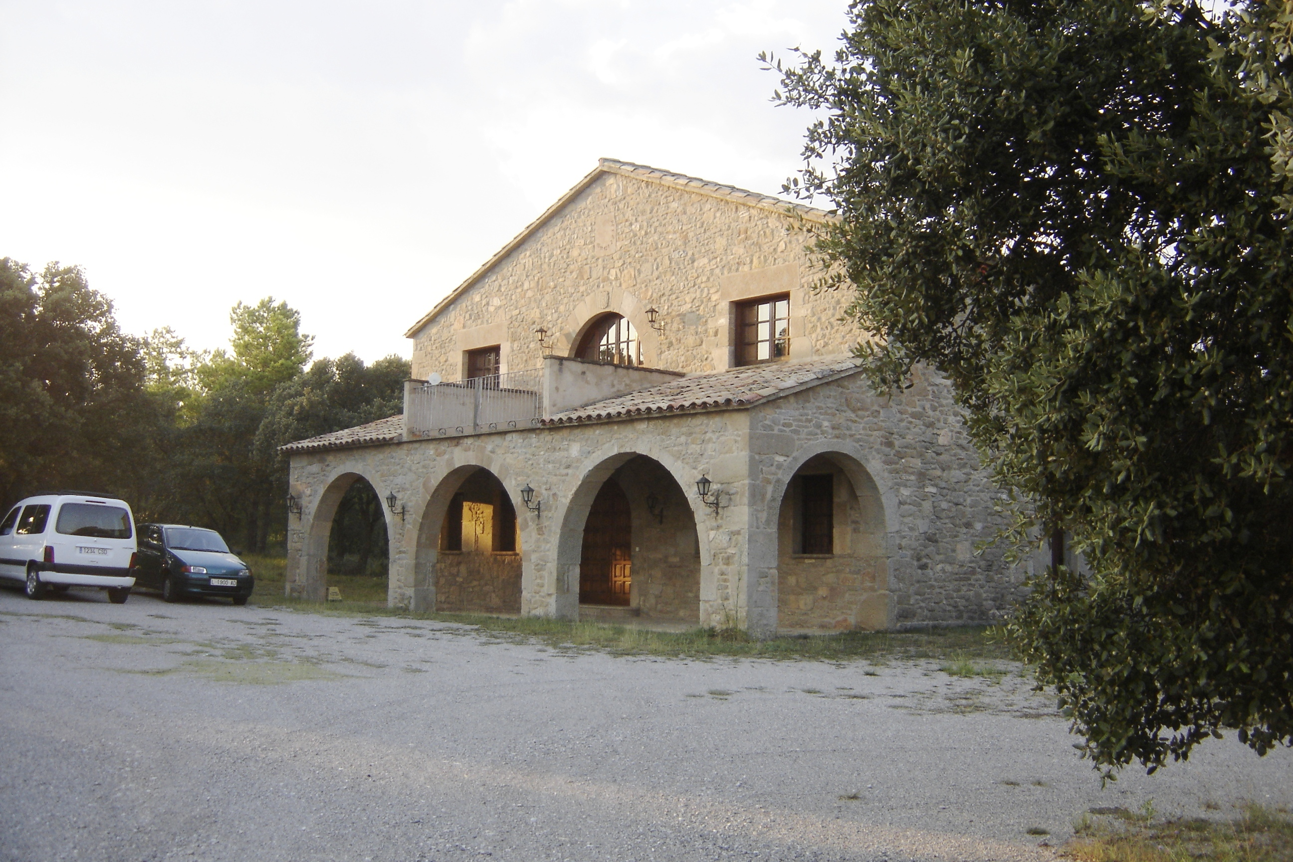 Navès (Solsonès) - L'ajuntament.